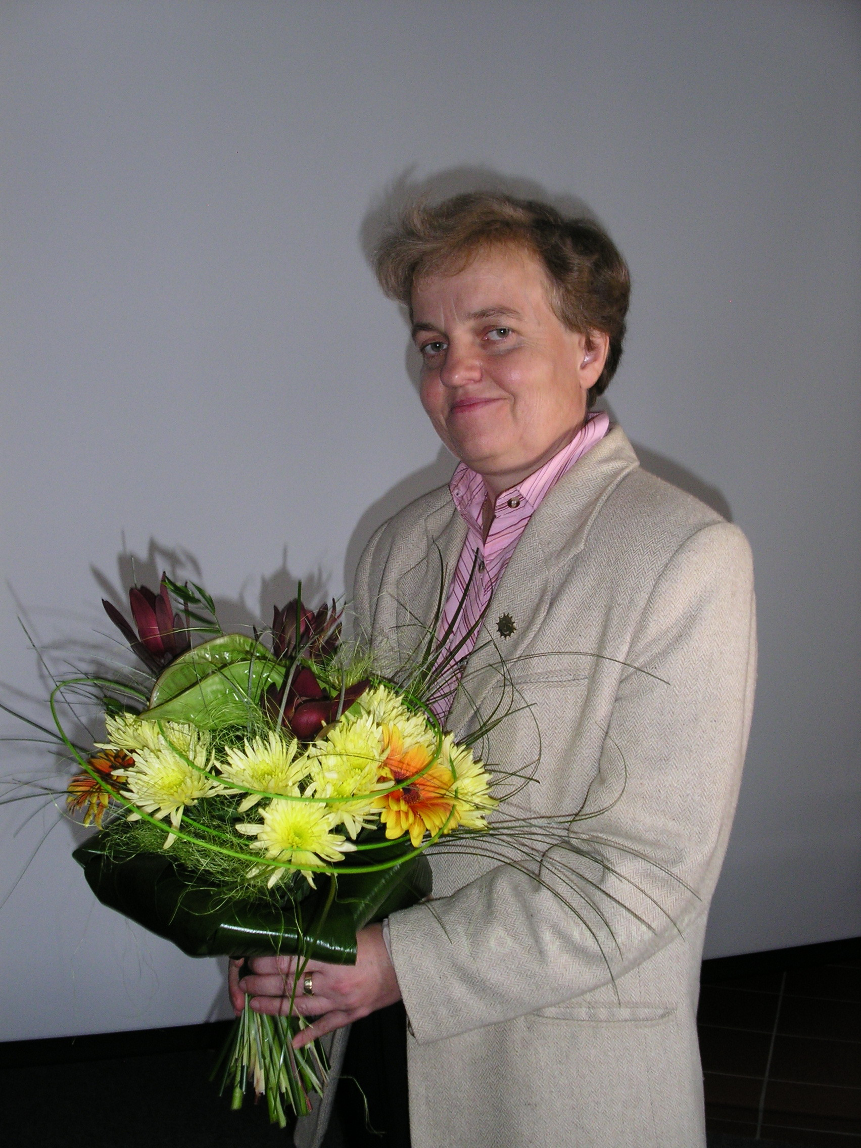 Ing. Dana Drábová ředitelka Státního úřadu pro jadernou bezpečnost.